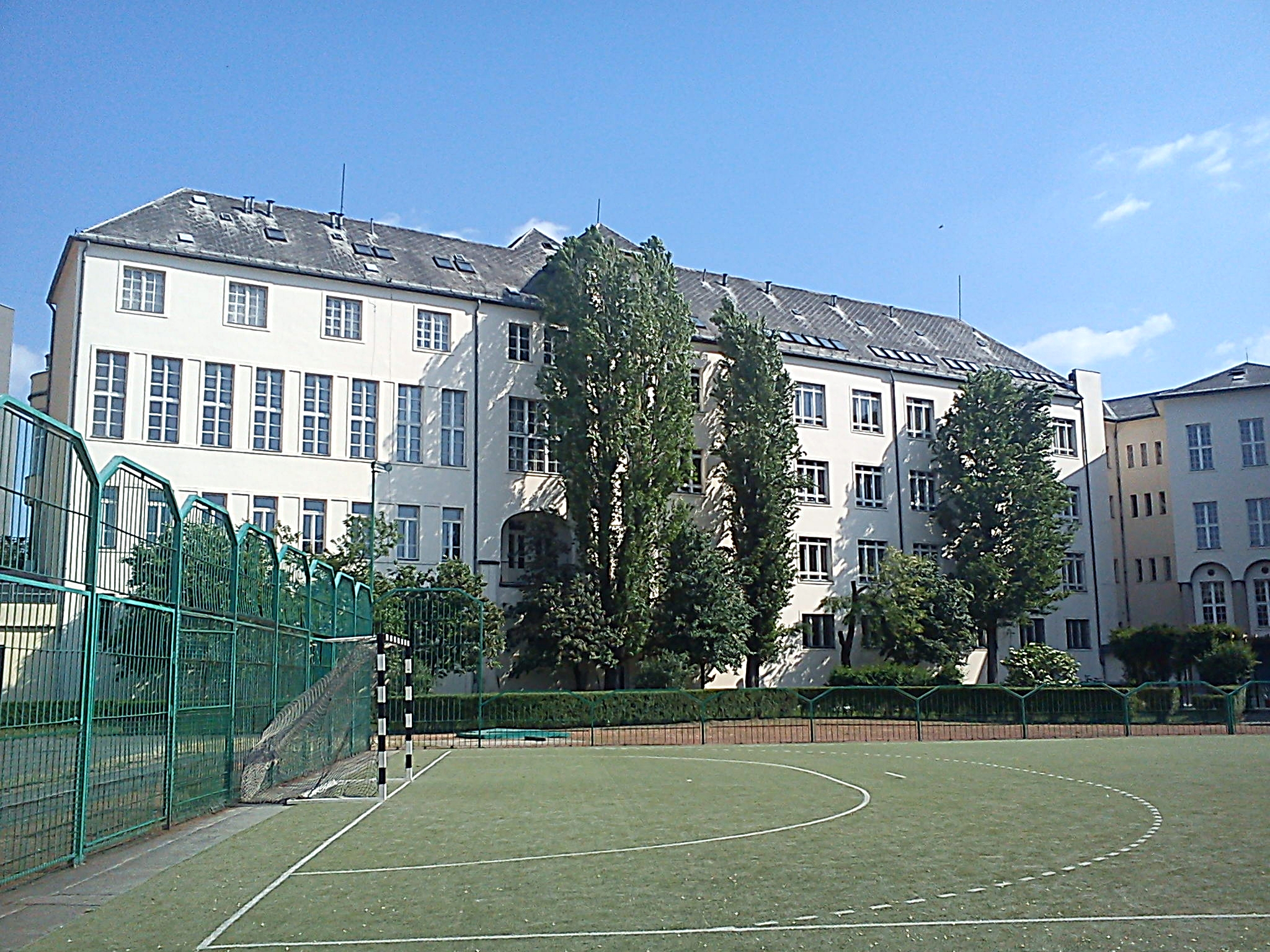 Az Szent László Gimnázium Kőrösi Csoma Sándor út felőli épületszárnya (Budapest)